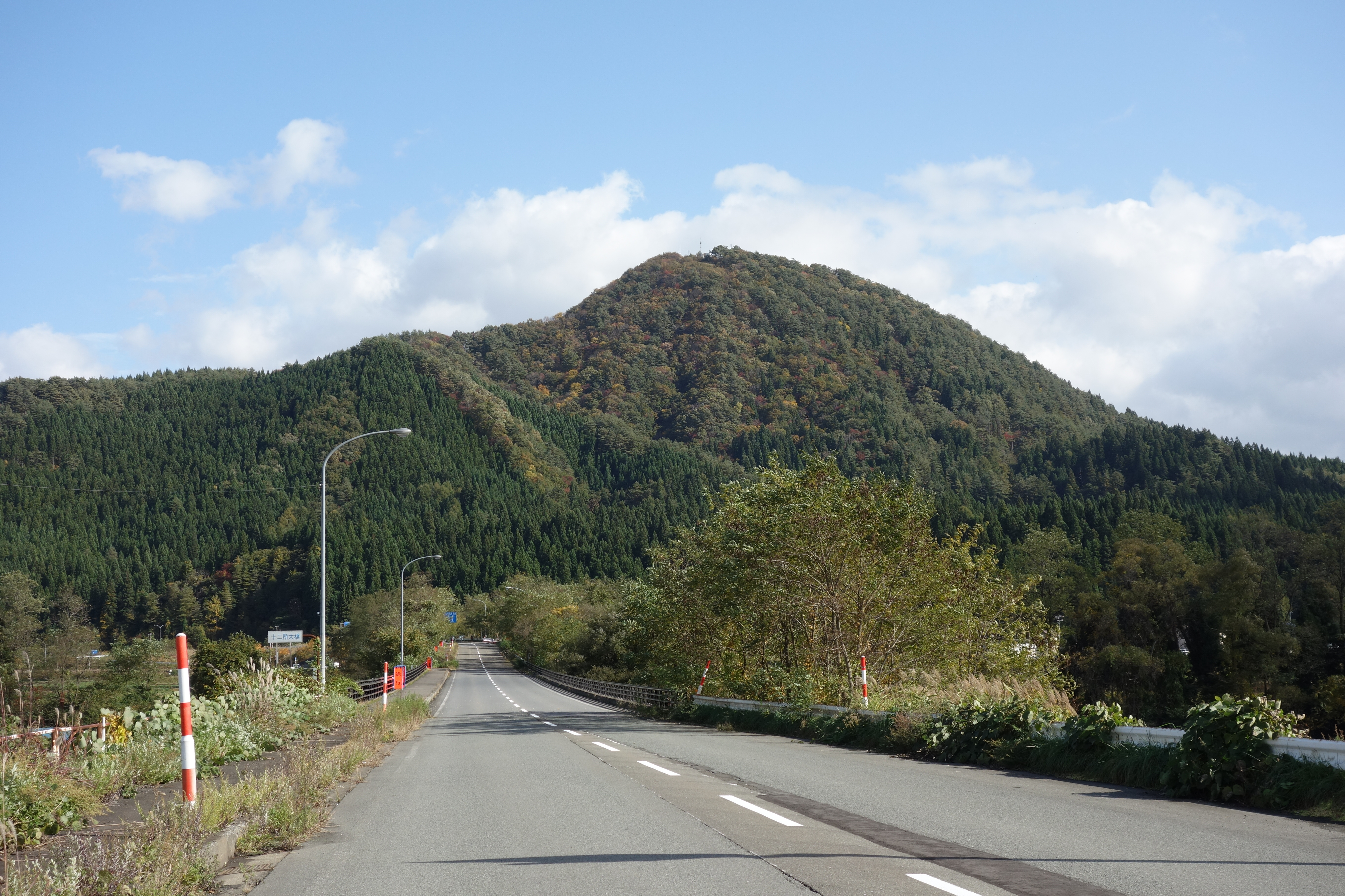 十二所大橋付近から望む三哲山 頂上には各社の電波塔がある